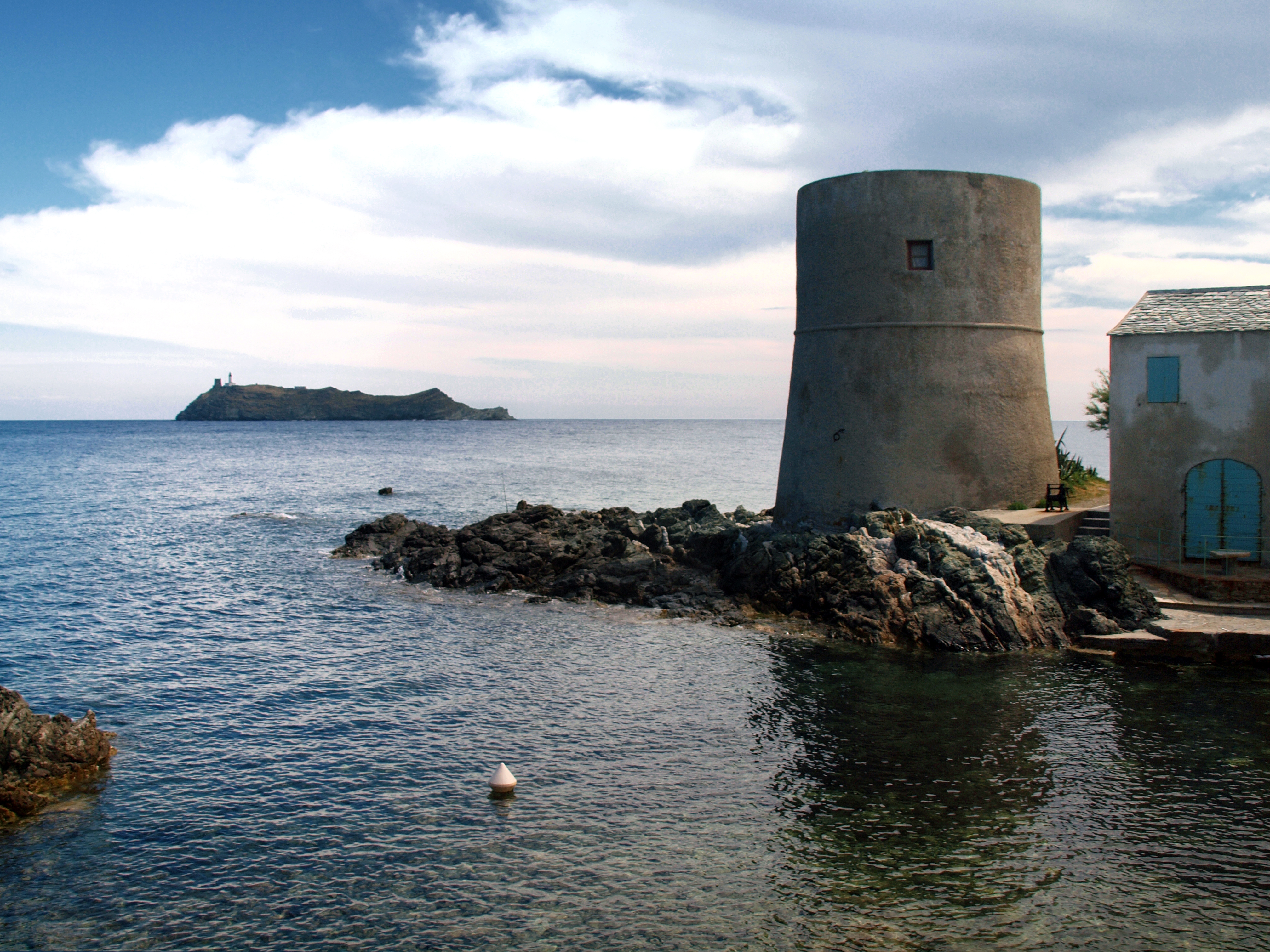 Ersa (Corse) - Tour génoise de Tollare. En arrière-plan, la Giraglia (tour et phare)